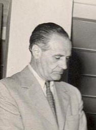 L'architetto Luciano Baldessari (Rovereto (TN), 10 dicembre 1986 - Milano, 26 settembre 1982).